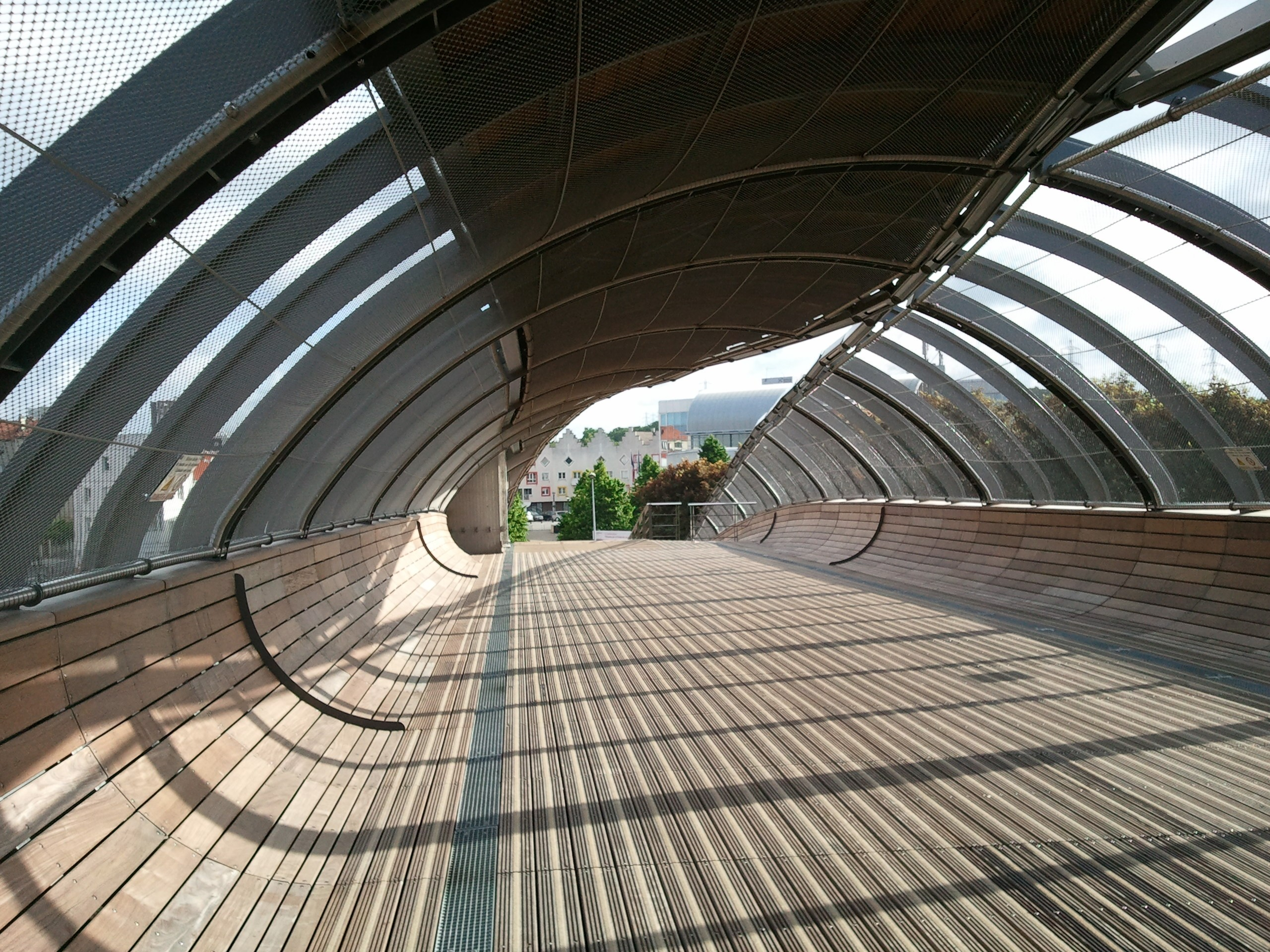 Passerelle de la gare de Villetaneuse-Université, vue vers le nord. En arrière plan, la place de l'Hôtel-de-Ville et l'Hôtel-de-Ville